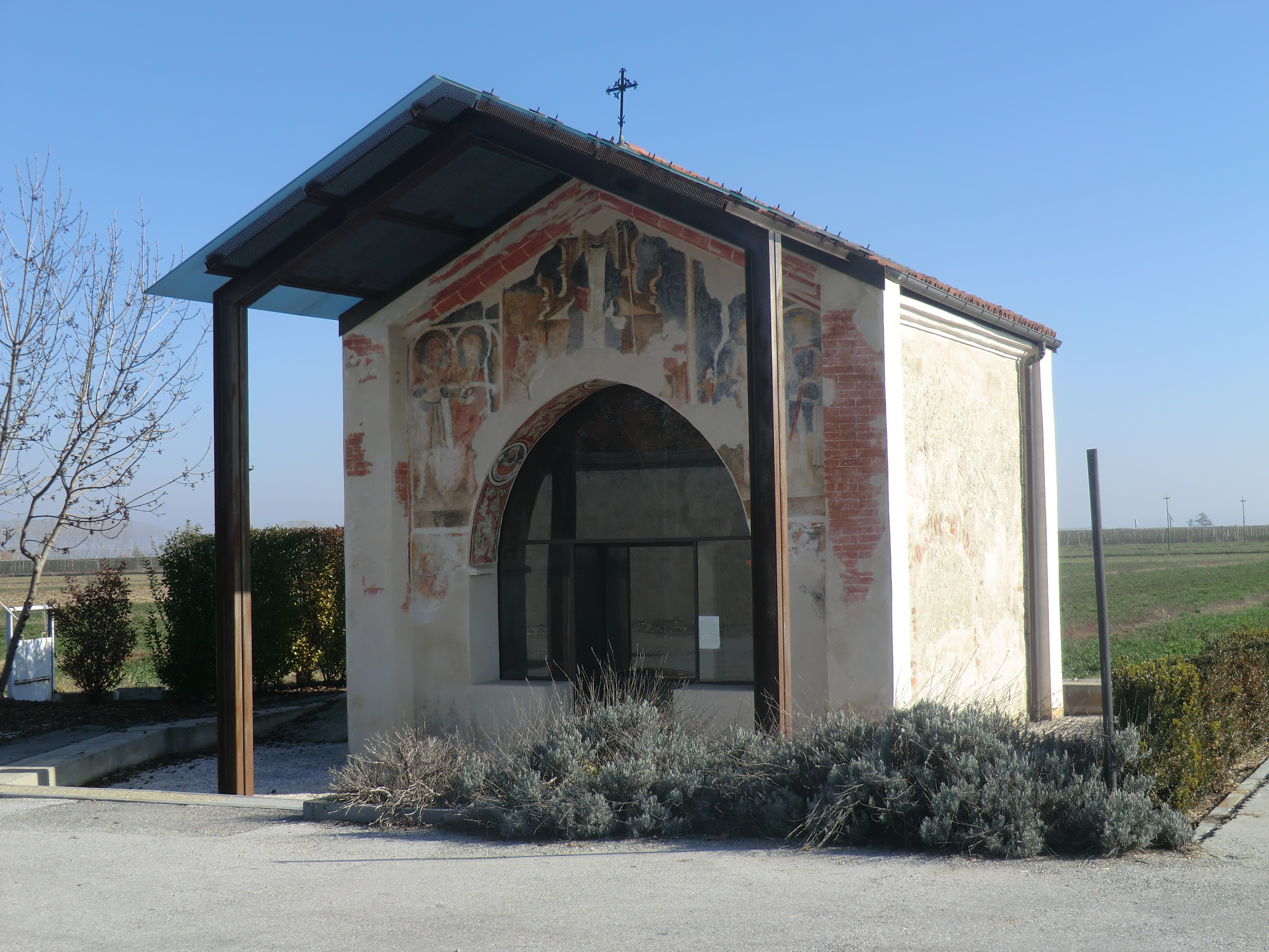 Castelletto Stura (Cuneo): cappella di San Bernardo (XV secolo); affreschi probabilmente di Giovanni Mazzucco datati 1483 o 1488(?)